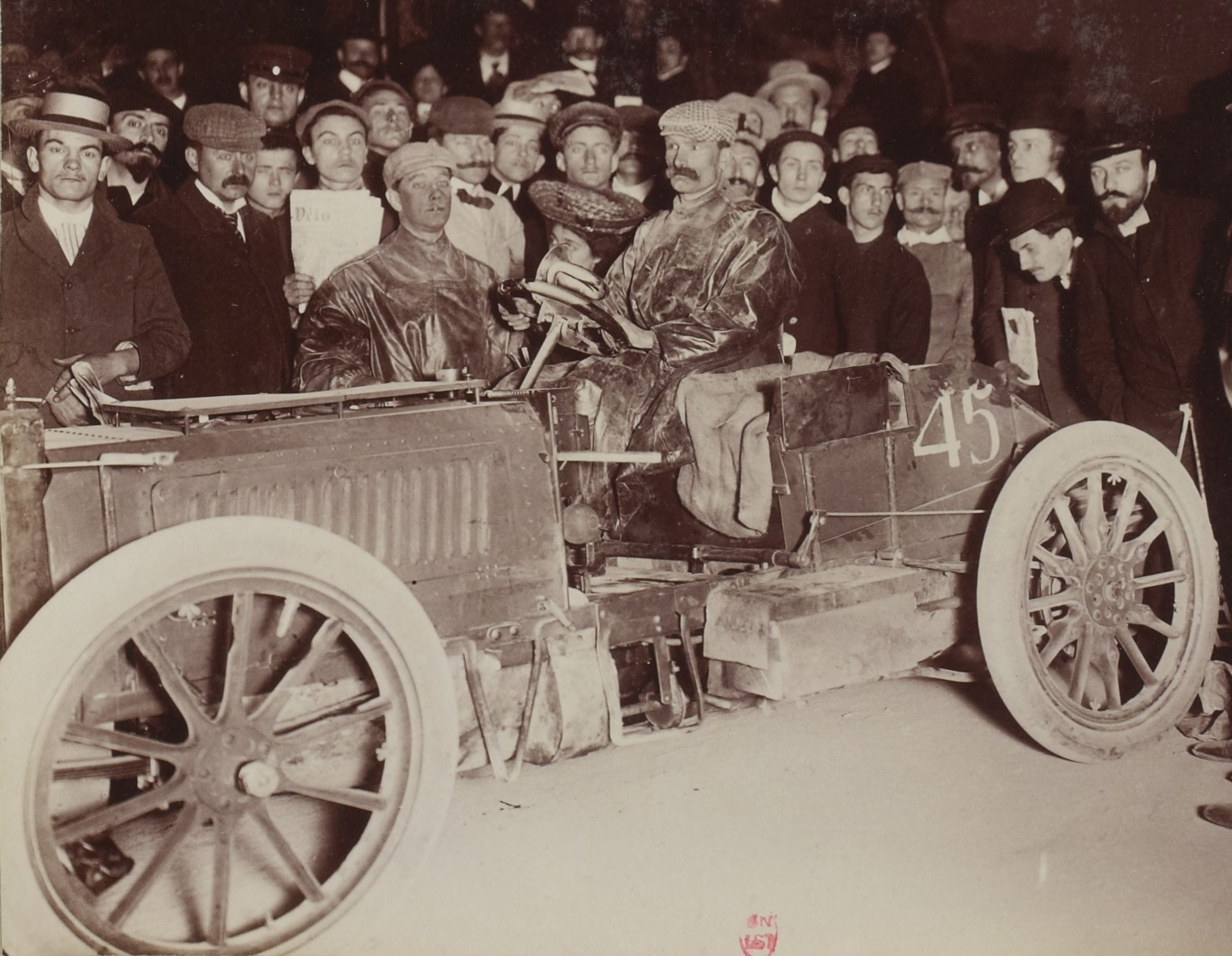 [Collection Jules Beau. Photographie sportive] : T. 18. Année 1902 / Jules Beau : F. 20. Paris - Vienne, [épreuve de vitesse], Champigny, 26 juin 1902